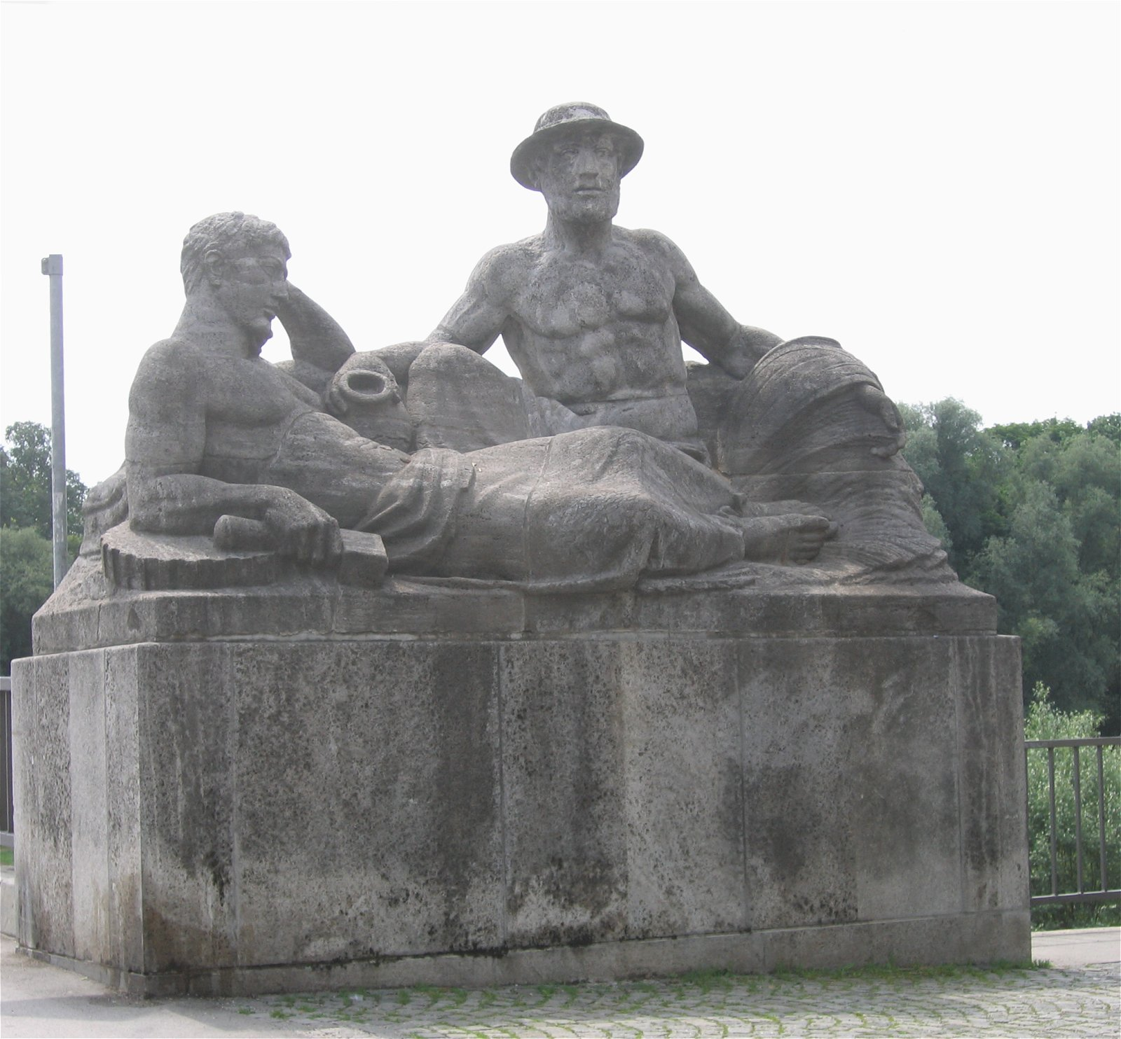 Reichenbachbrücke in München, Skulptur im SW